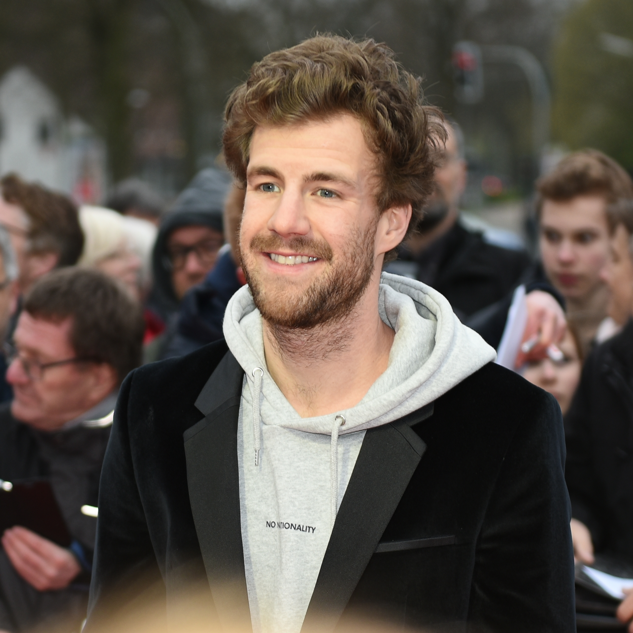 Verleihung des Grimme-Preises 2019.